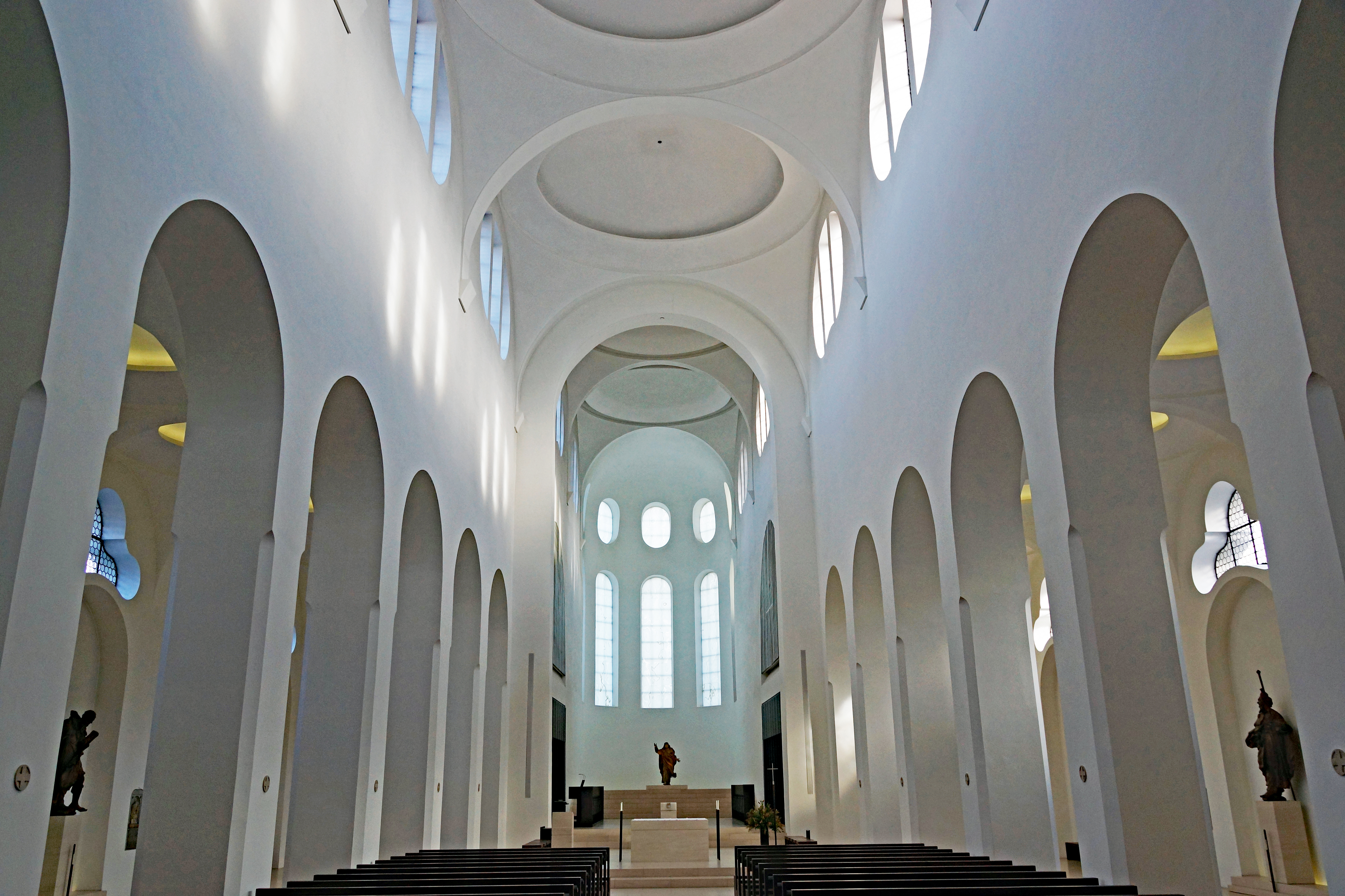 2019-01-27 Augsburg 059 Moritzkirche